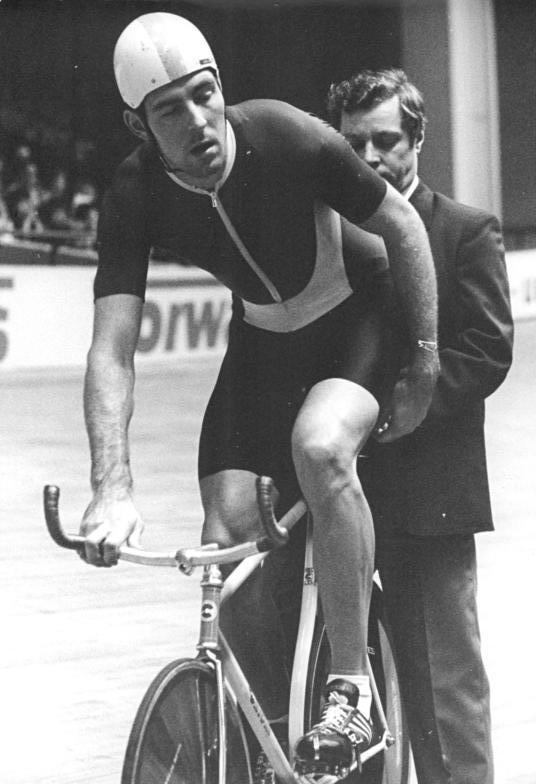 Jens Lehmann ADN-ZB Müller-7.1.90 Frankfurt (Oder): Radsport - Meisterschaften - In der Oderlandhalle der Bezirksstadt ließ im Finale der 4. 000-Meister-Einzelverfolgung Vizeweltmeister Jens Lehmann (SC DHfK Leipzig) keine Sschwächen erkennen bei einer Siegerzeit von 4:40,26 Minuten. Abgebildete Personen: Jens Lehmann (Radsportler)